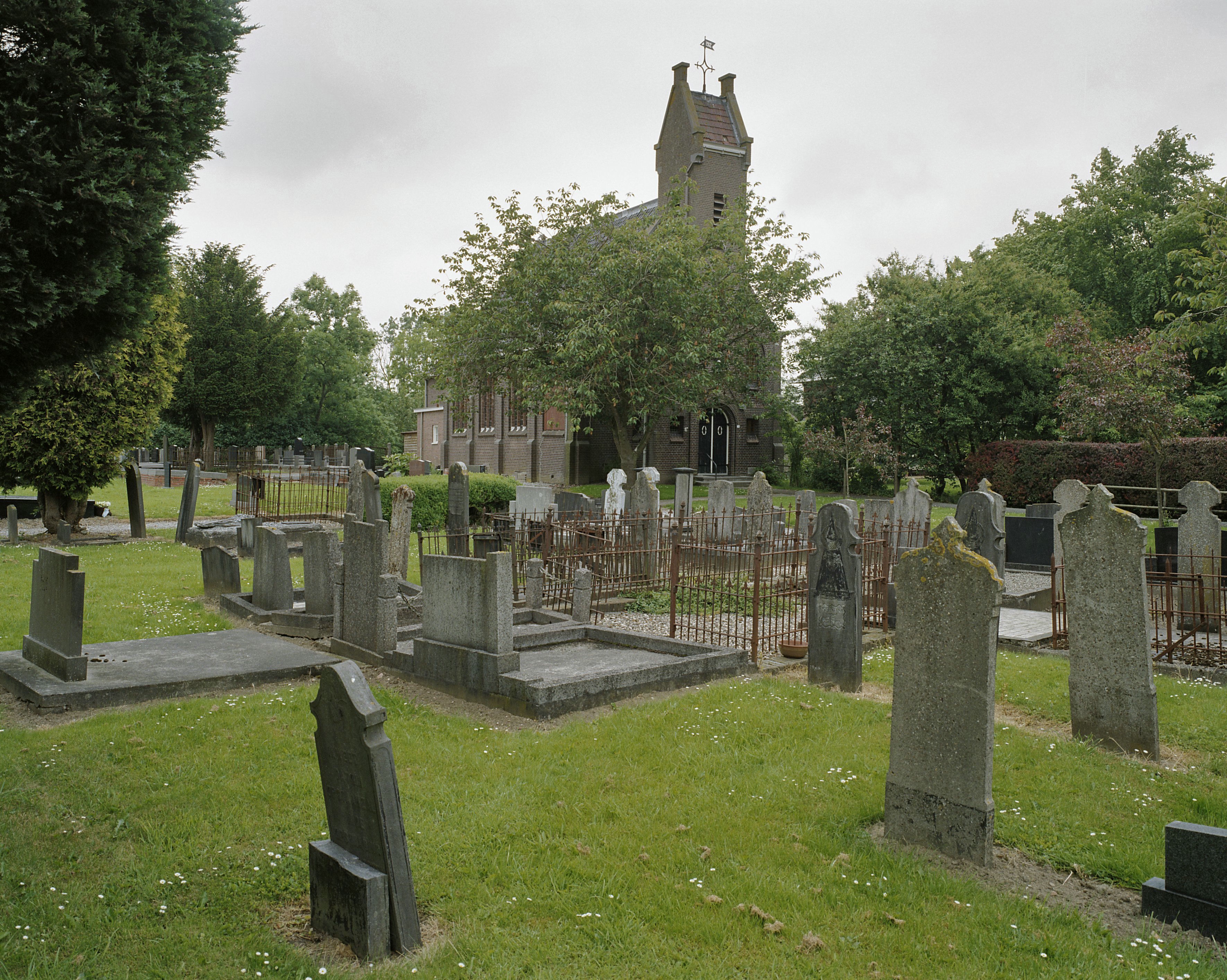 Nederlands Hervormde Kerk: Overzicht kerkhof met de kerk op de achtergrond